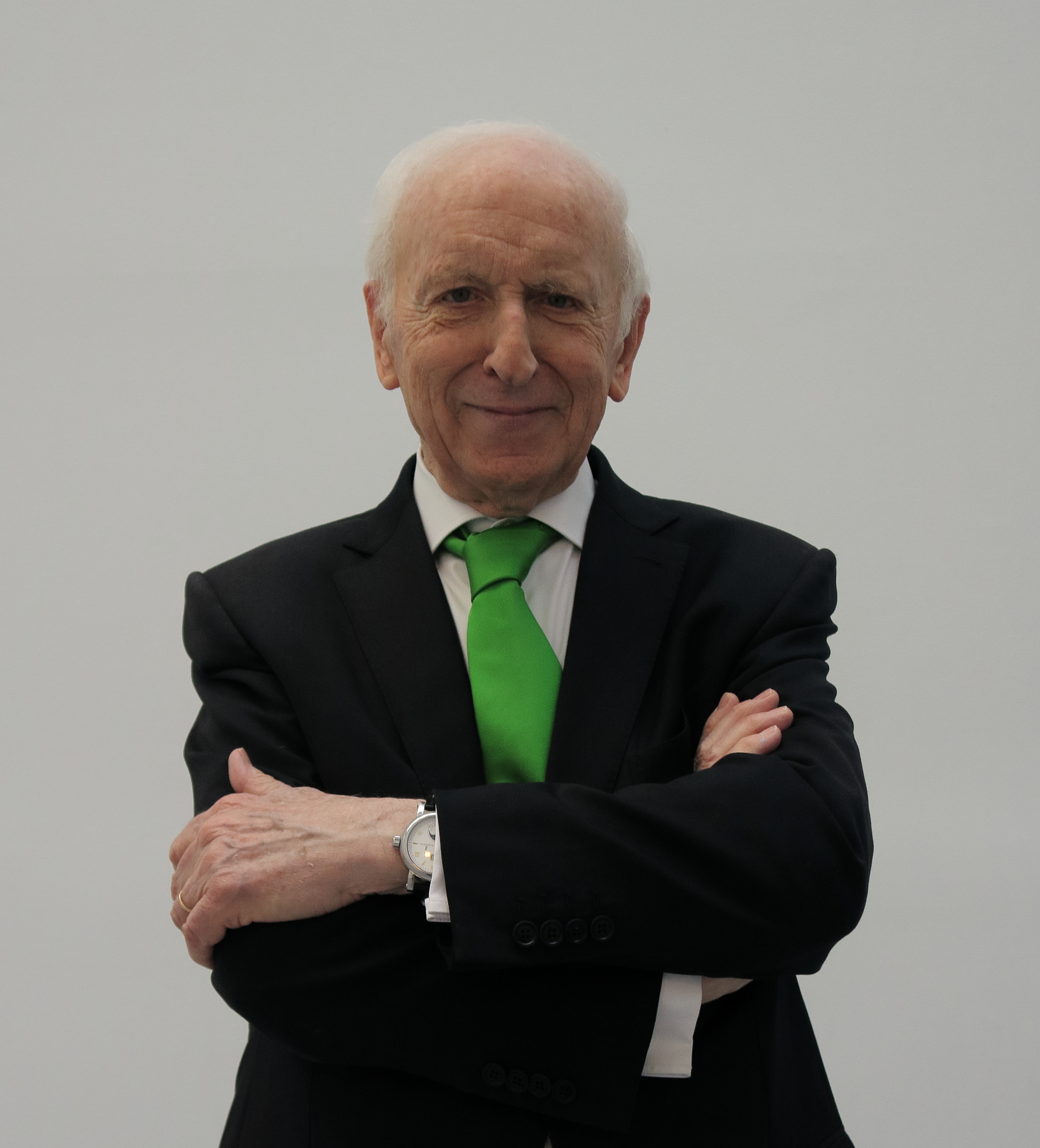 Leopoldo Abadía, para Wikipedia